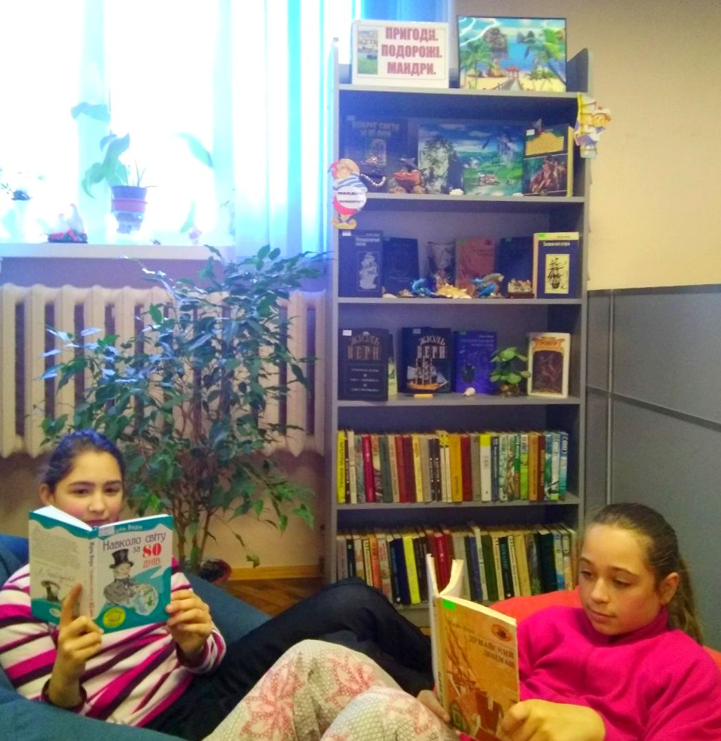 користувачі бібліотеки ім. Довженка